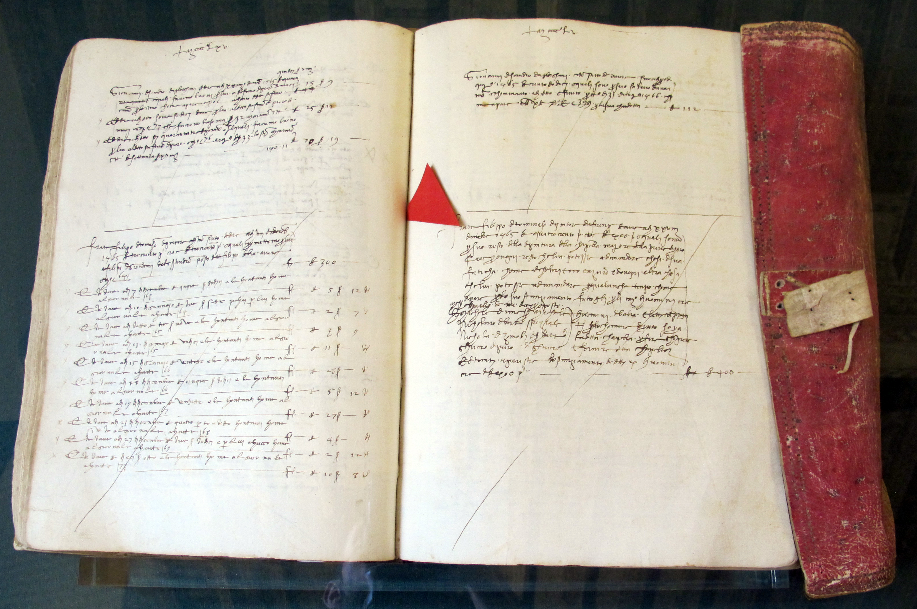 Palazzo Datini, Prato